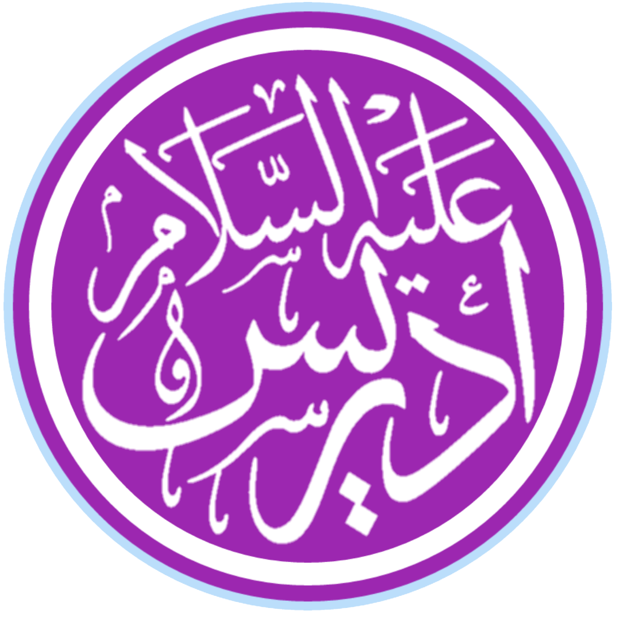 ادریس علیہ السلام